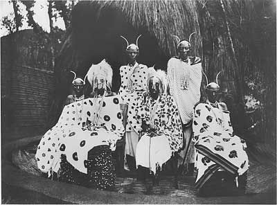 Musinga (Yuhi), roi du Rwanda de 1896 à 1931, photographié avec des hommes de sa famille vers 1910.